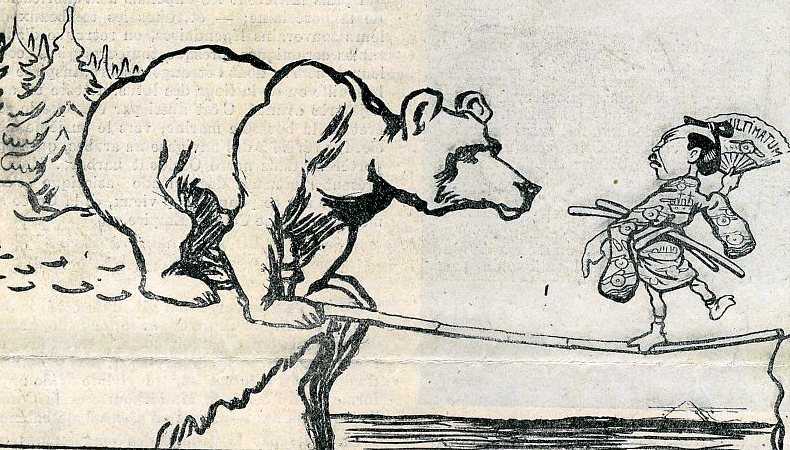 La perche terrible Périlleux exercice japonais